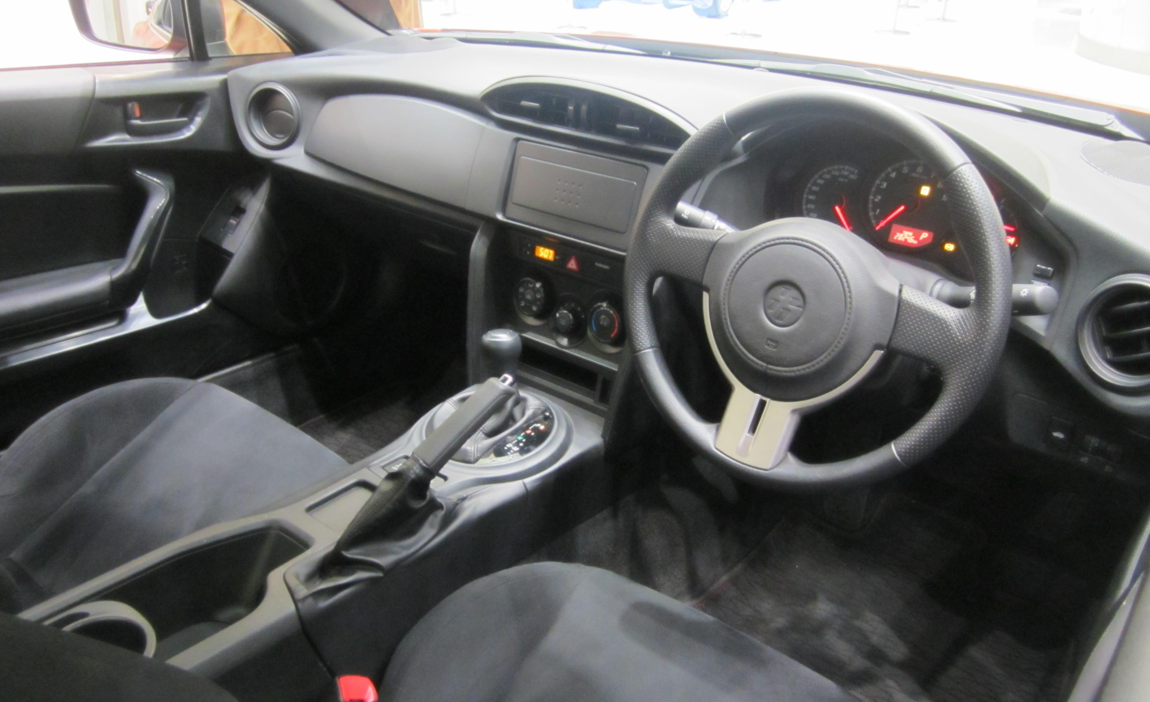 トヨタ・86の運転席。